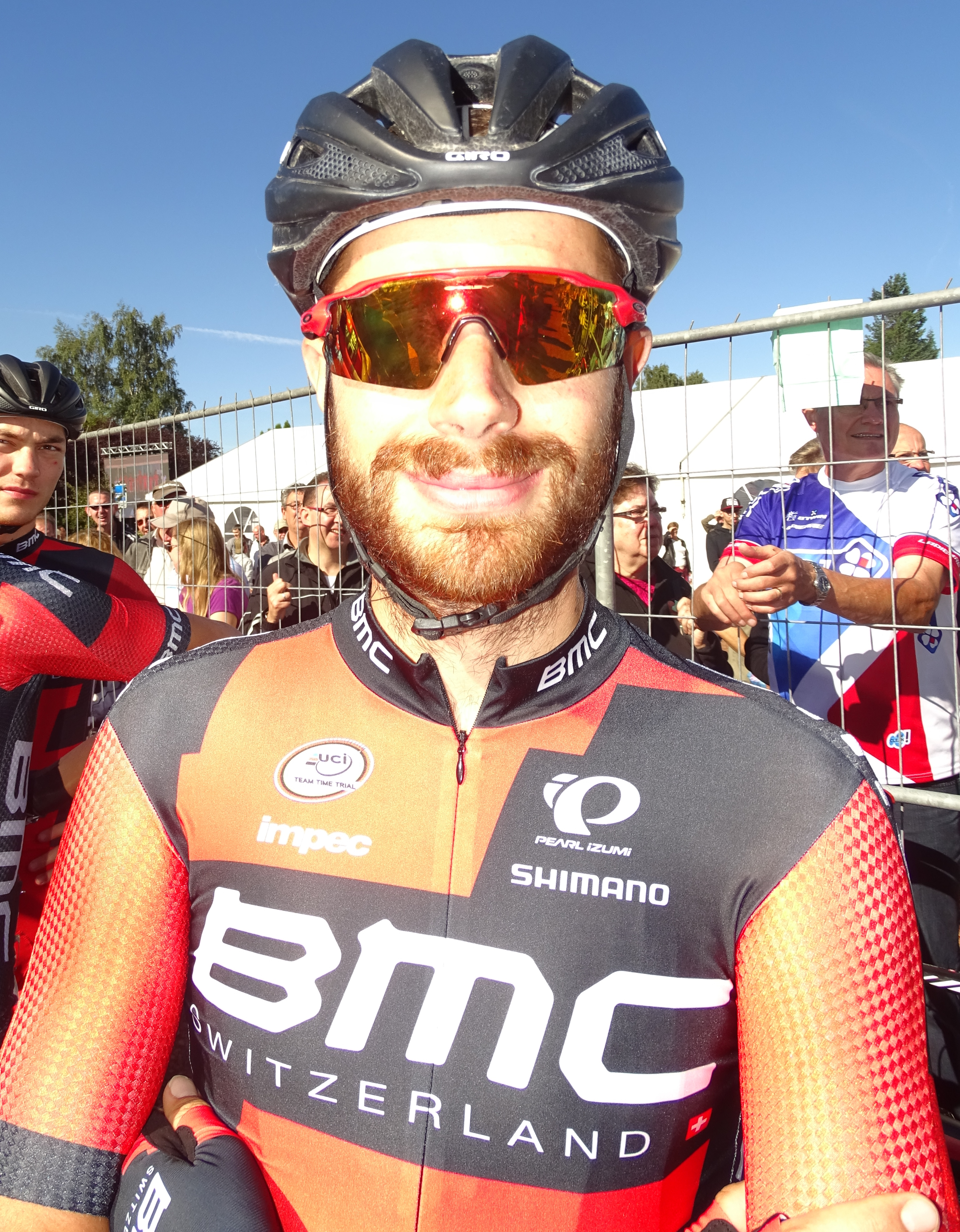 Reportage réalisé le dimanche 20 septembre à l'occasion du départ et de l'arrivée du Grand Prix d'Isbergues 2015 à Isbergues, Nord-Pas-de-Calais, France.